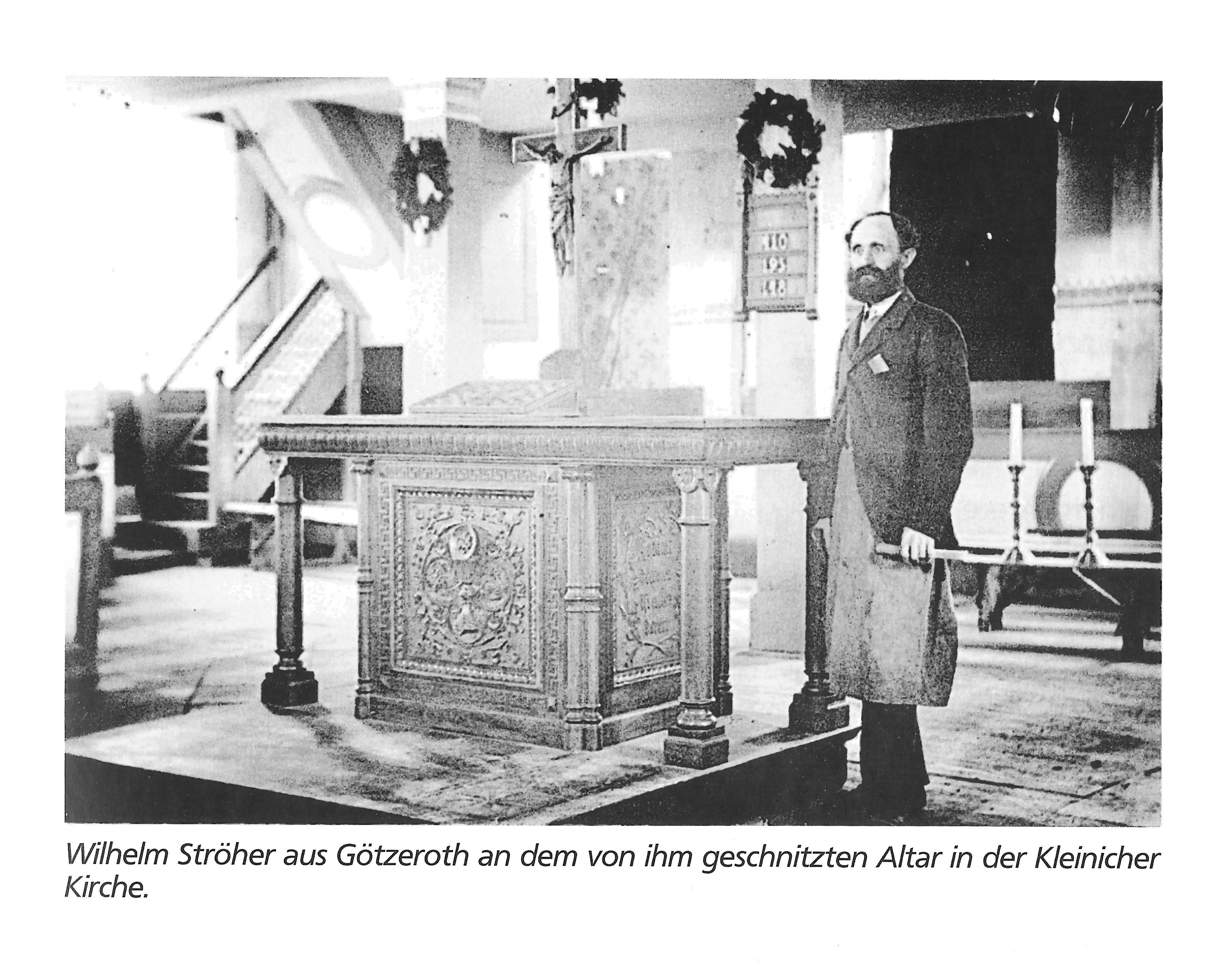 Die Kirche in Kleinicht - Wilhelm Ströher aus Götzeroth neben dem von ihm geschaffenen Schnitzaltar 1901